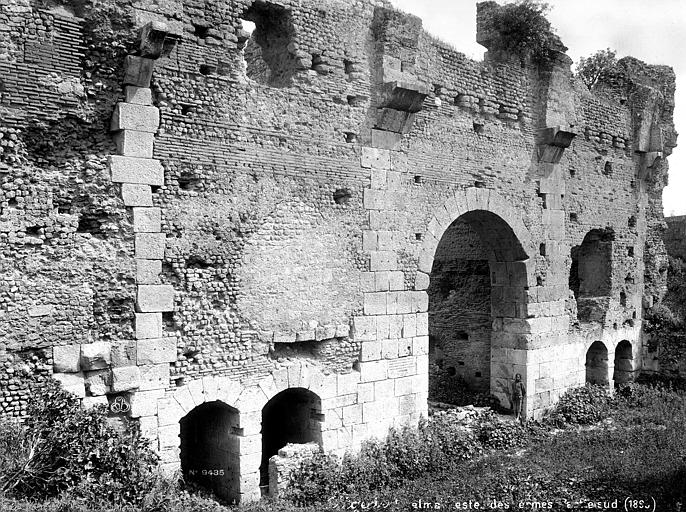 Vue des thermes de Guelma, Algérie. Photographie de Séraphin-Médéric Mieusement.